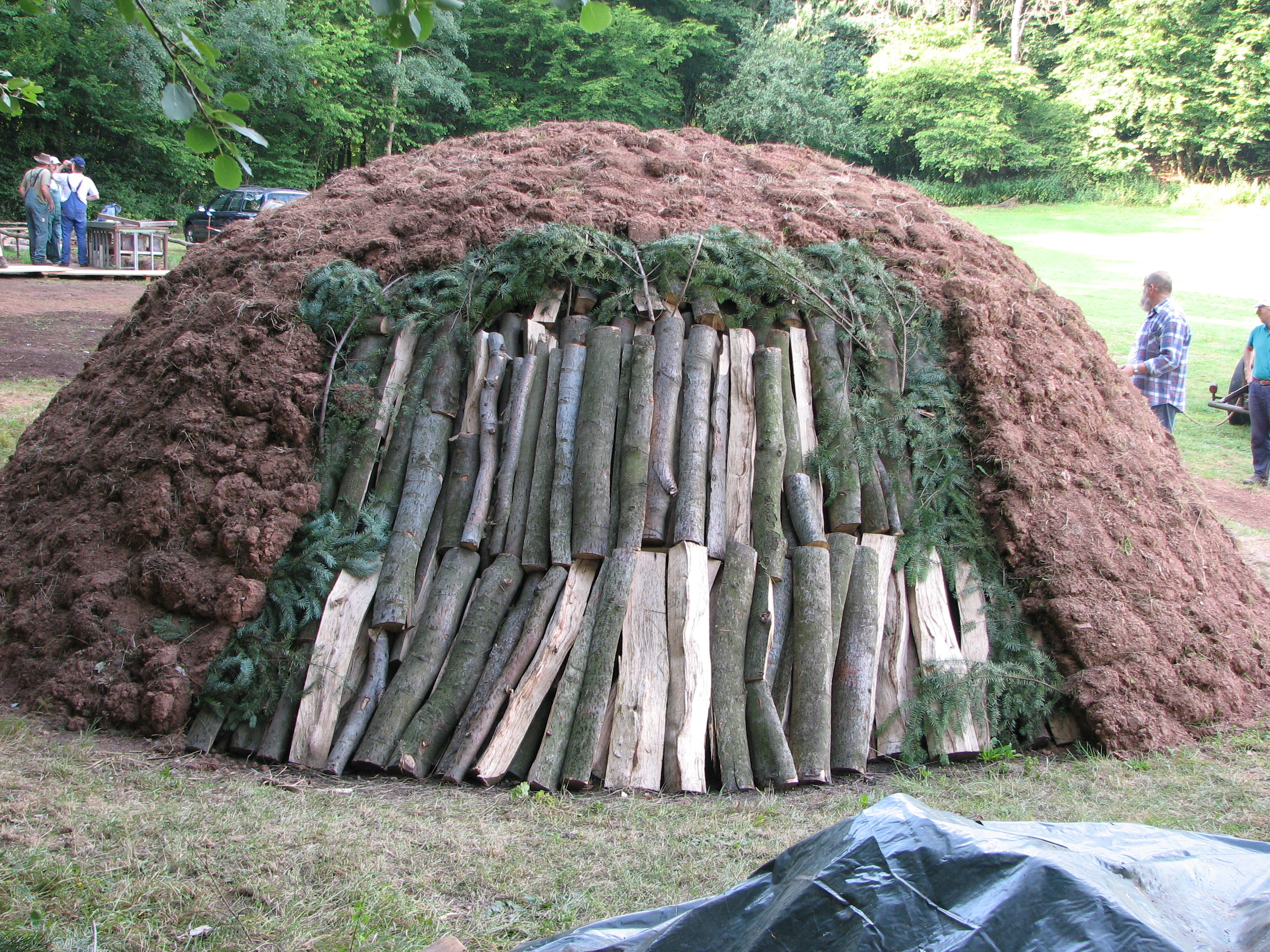 Kohlenmeiler: Aufbau des Meilers